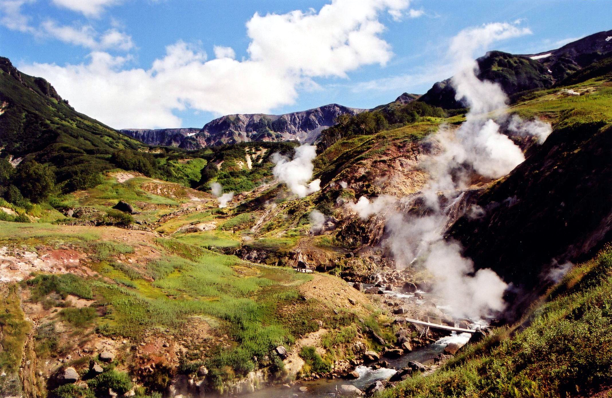 La vallée des geysers est située au nord-est de la péninsule du Kamtchatka. Une des plus grande concentration de geysers au monde. Un site classé au patrimoine mondial de l'Unesco.